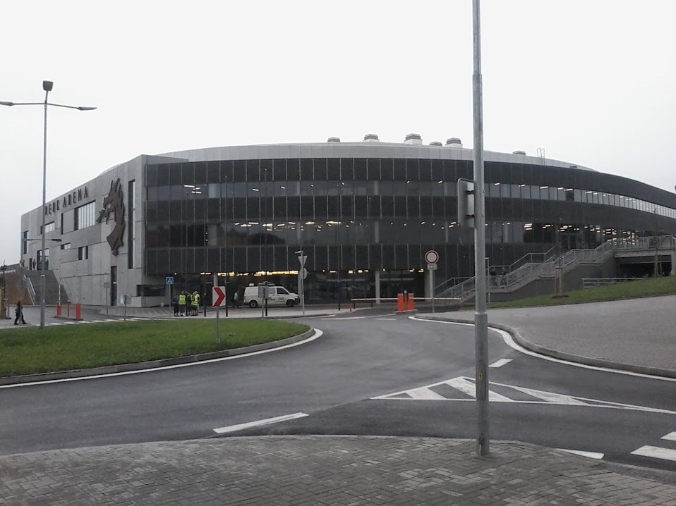 Celkový pohled